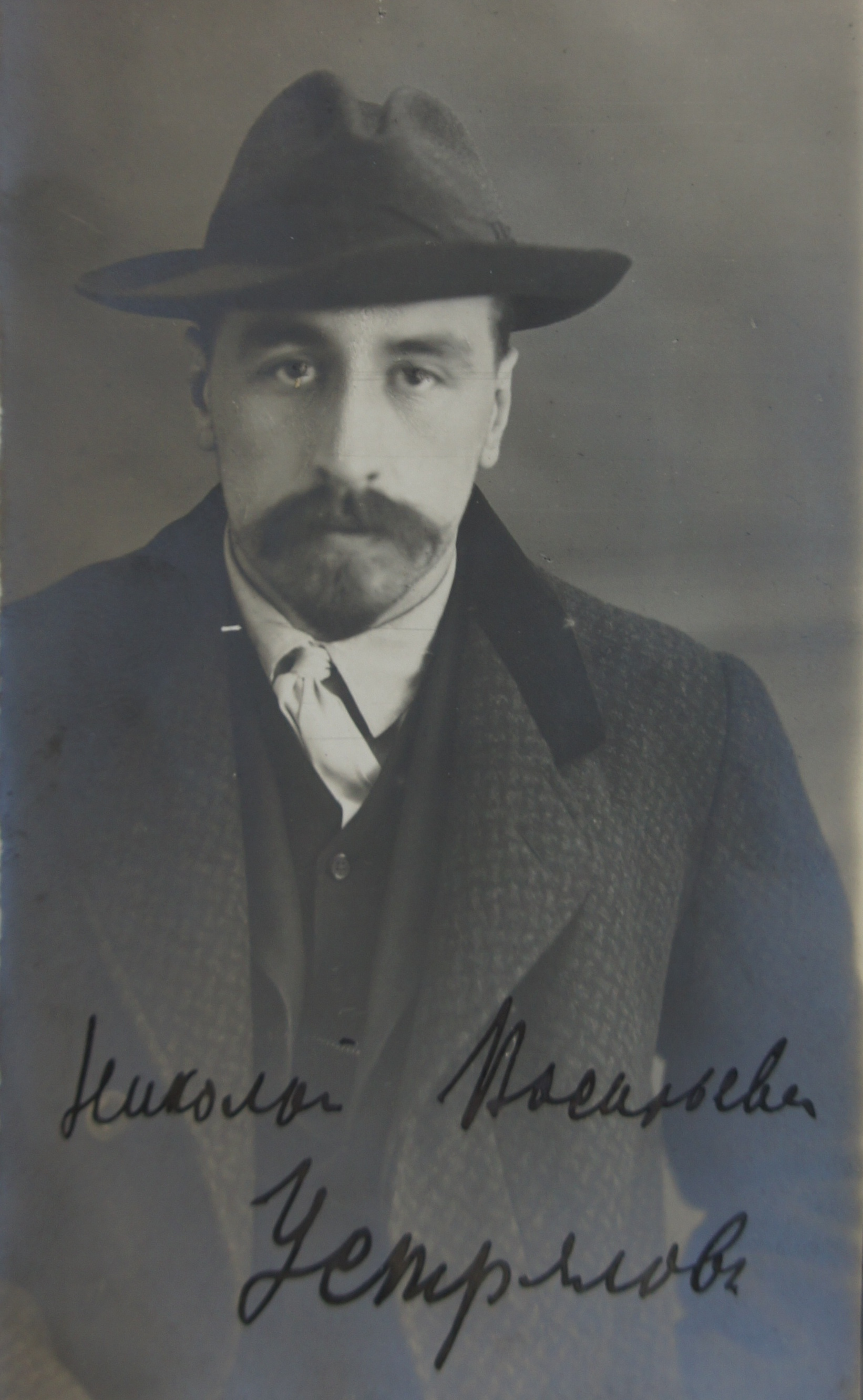 фото студента для дела юридической испытательной комиссии 19132 г.